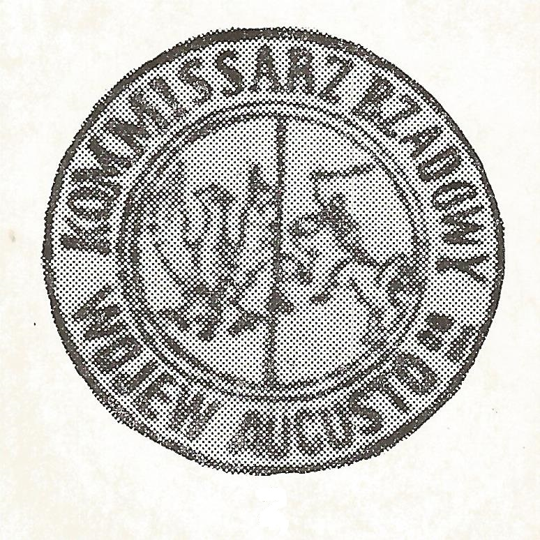 Pieczęć z okresu powstania styczniowego używana przez Cyriaka Accorda. Opis: KOMMISSARZ RZĄDOWY (góra), WOJEW: AUGUSTOgo (dołem) - średnica 27 mm. [28 marca] 1863 r.-4 czerwca 1863 r. Tłok pieczęci został przekazany w 1913 r. do archiwum miasta Lwowa przez córkę Cyriaka Accorda. Inf. na podst. "Pieczęcie powstańcze 1863-1864" J. Sztakelberg, Warszawa 1988